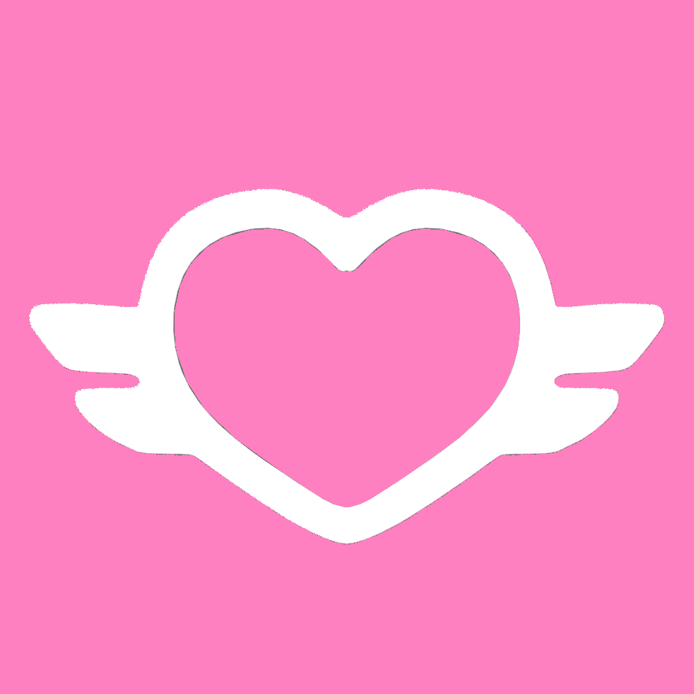 Banner der Charakterfigur Dizzy aus der Zeichentrickserie Super Wings.